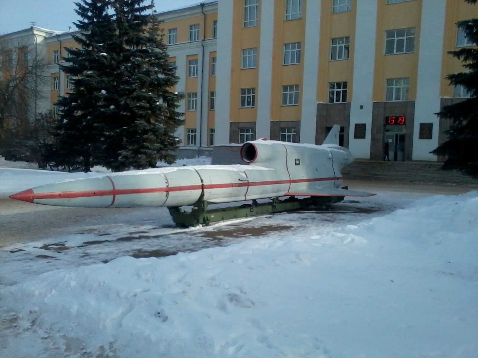 ТУ-143 в г. Уфе